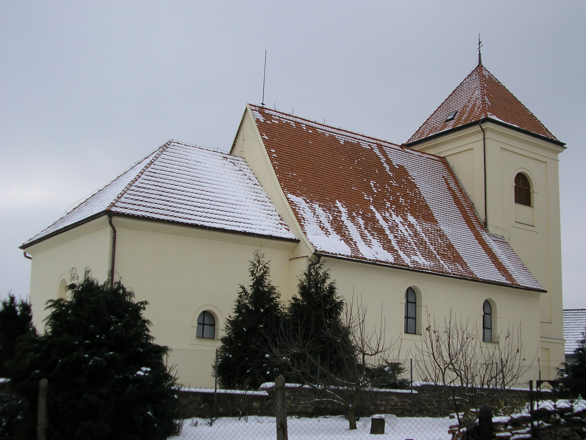 Kostel svatého Václava, Bratčice (okres Kutná Hora).